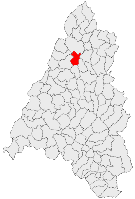 Categorie:Hărţi ale judeţului Bihor